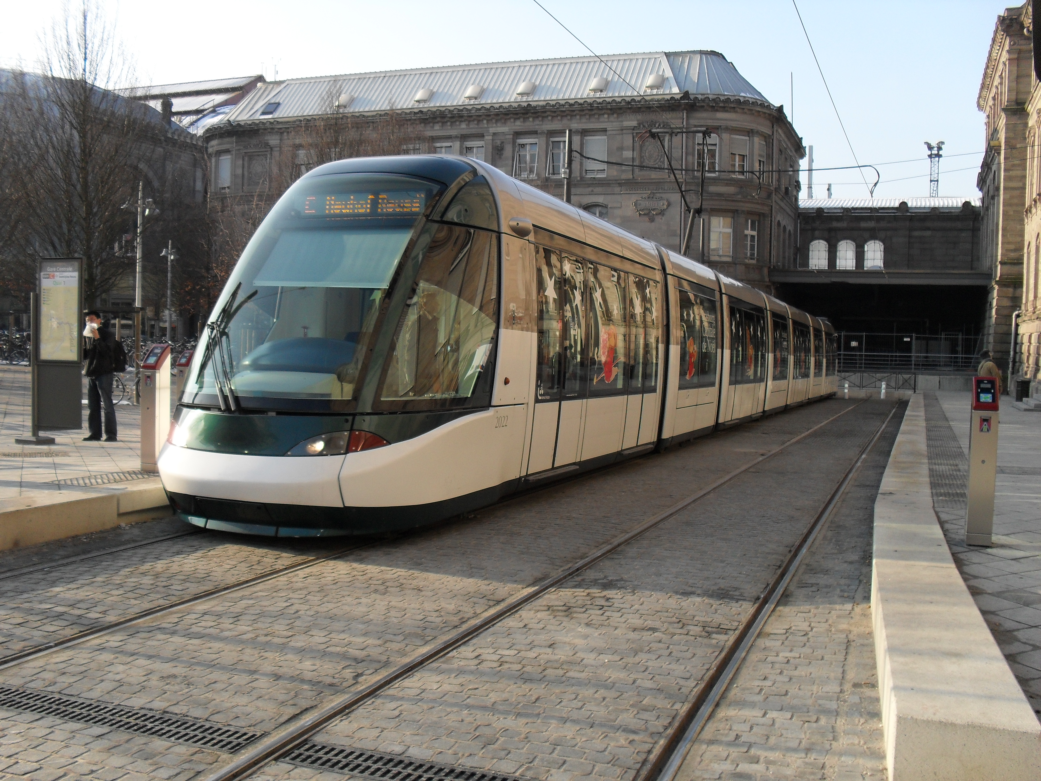 Tram Strasbourg Line C